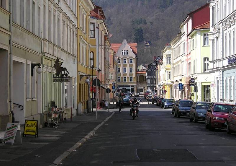 Meiningen - Blick in die Ludwig-Chronegk-Straße im Stadtzentrum, benannt nach dem Regisseur Ludwig Chronegk, Mitinitiator der Theaterreform am Meininger Hoftheater.